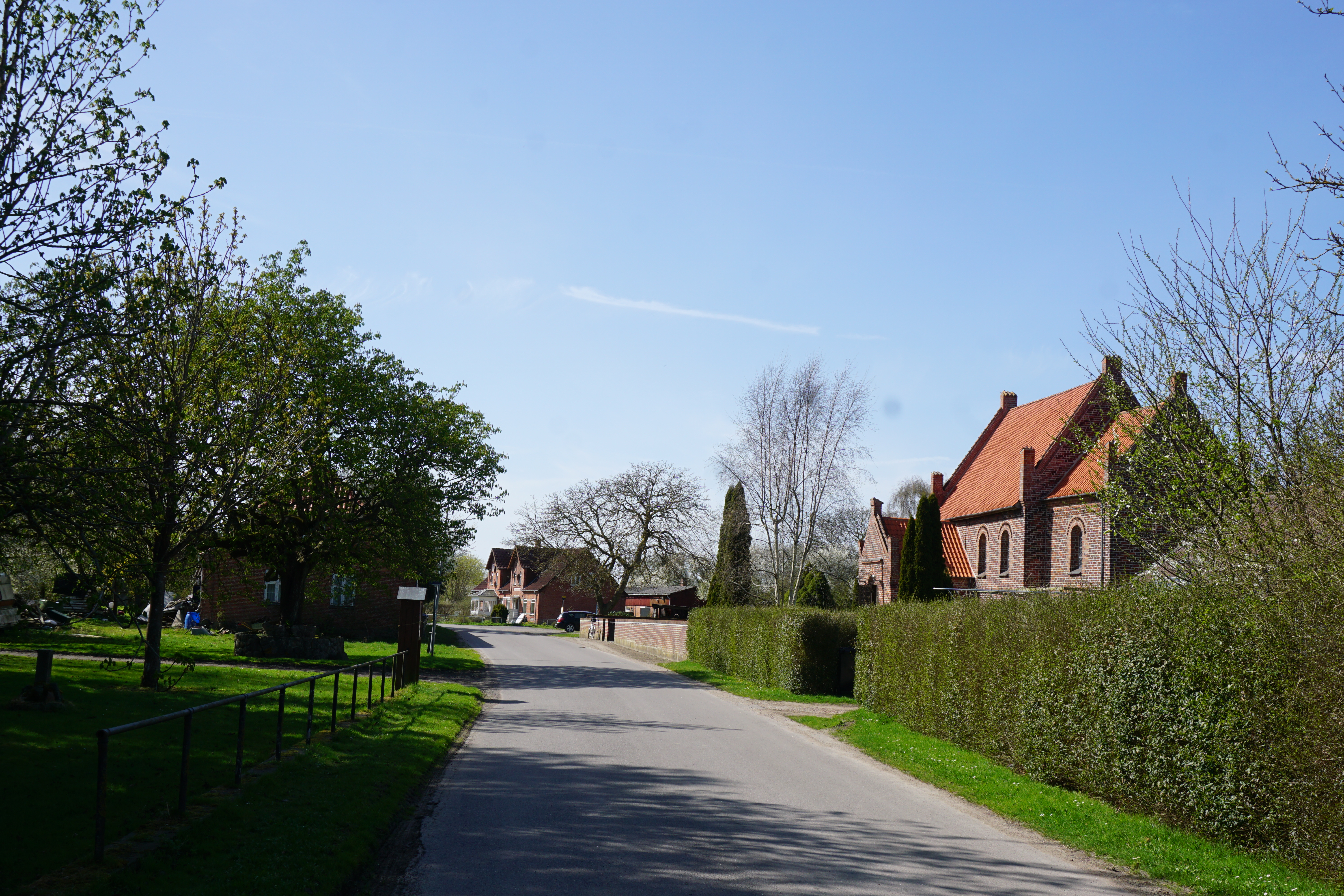 Krøngevej on Lolland, Denmark